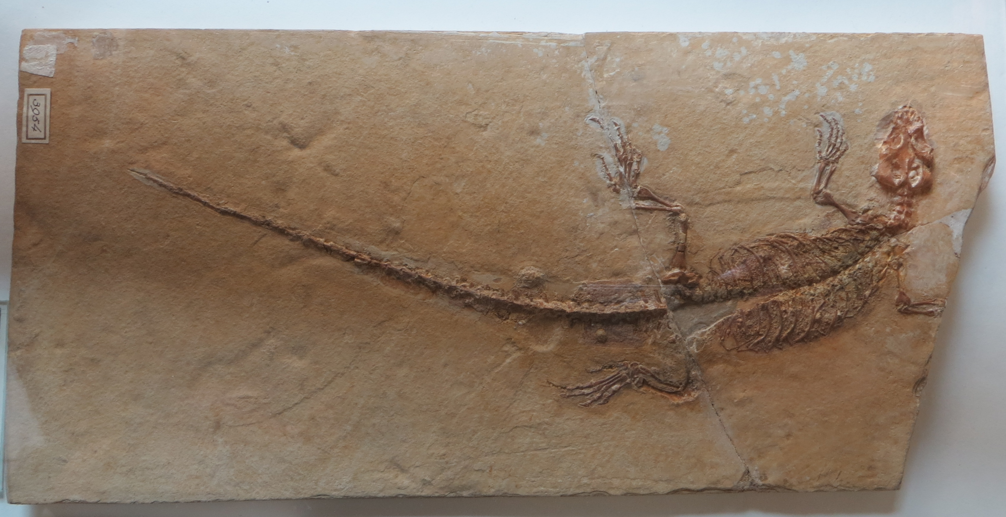 Fossil of Sapheosaurus, an extinct reptile- Took the picture at Teylers Museum, Haarlem